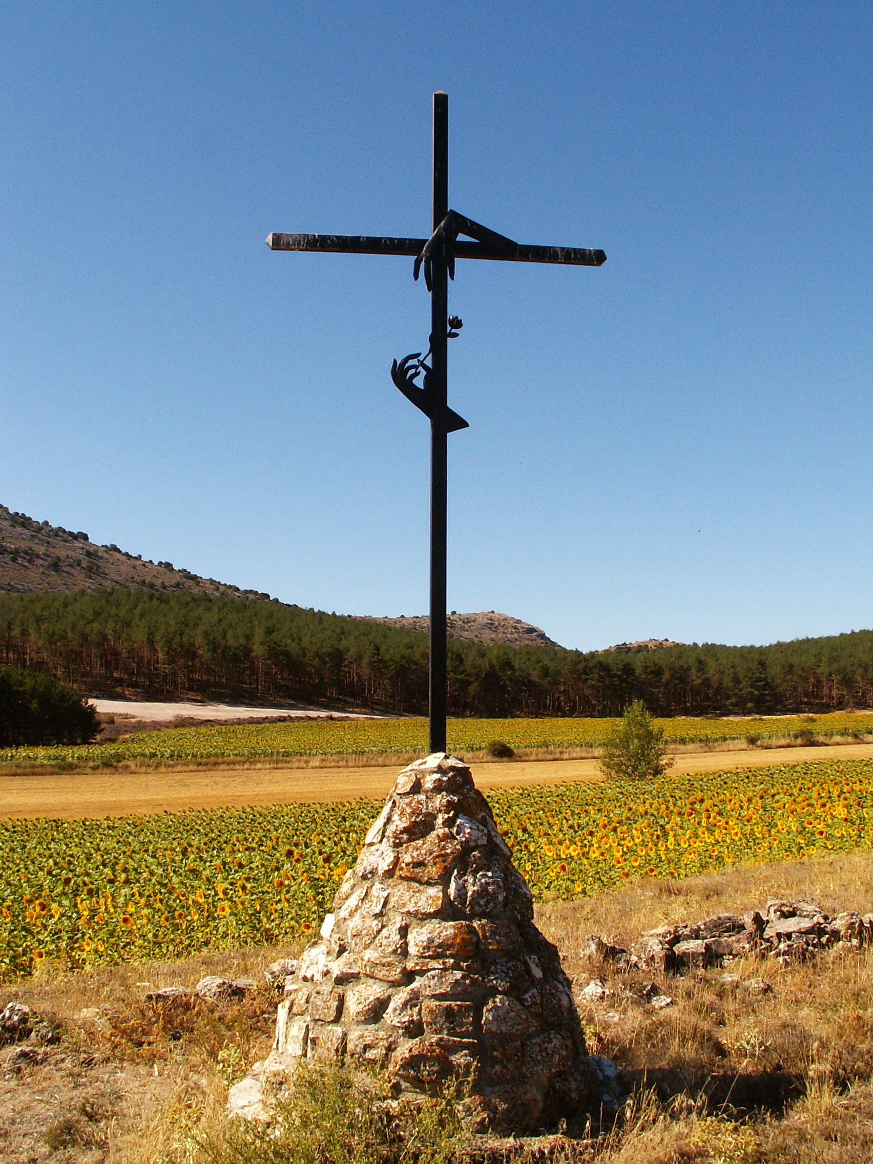 La quinta cruz del viacrucis que lleva al Santuario de la Virgen de Inodejo, cerca de Las Fraguas (Soria).